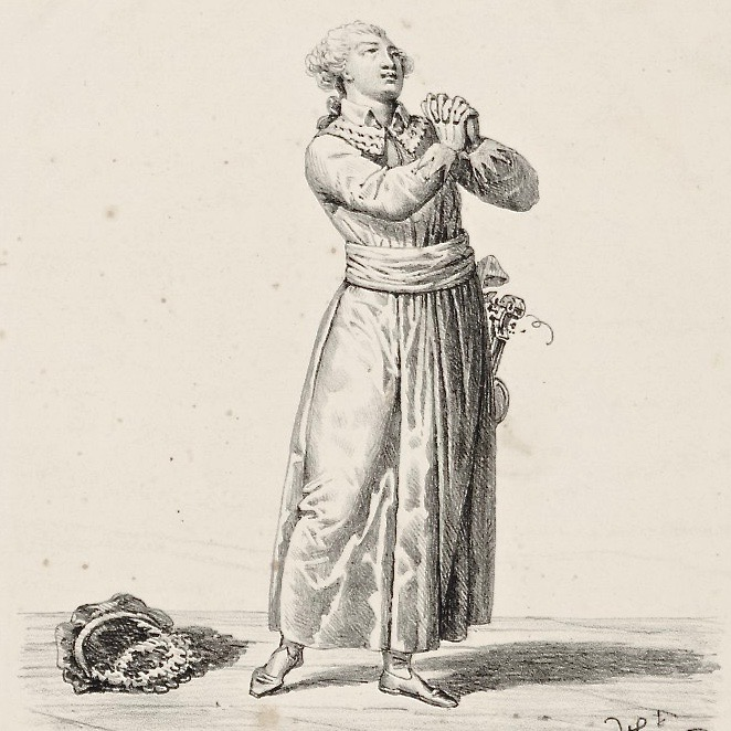 Hippolyte Lecomte (1781–1857): Der Sänger Jean-Baptiste Guignard genannt Clairval in der Rolle des Blondel in der Opéra-comique Richard Cœur de Lion" von André-Ernest-Modeste Grétry, 1830. Bibliothèque nationale de France.